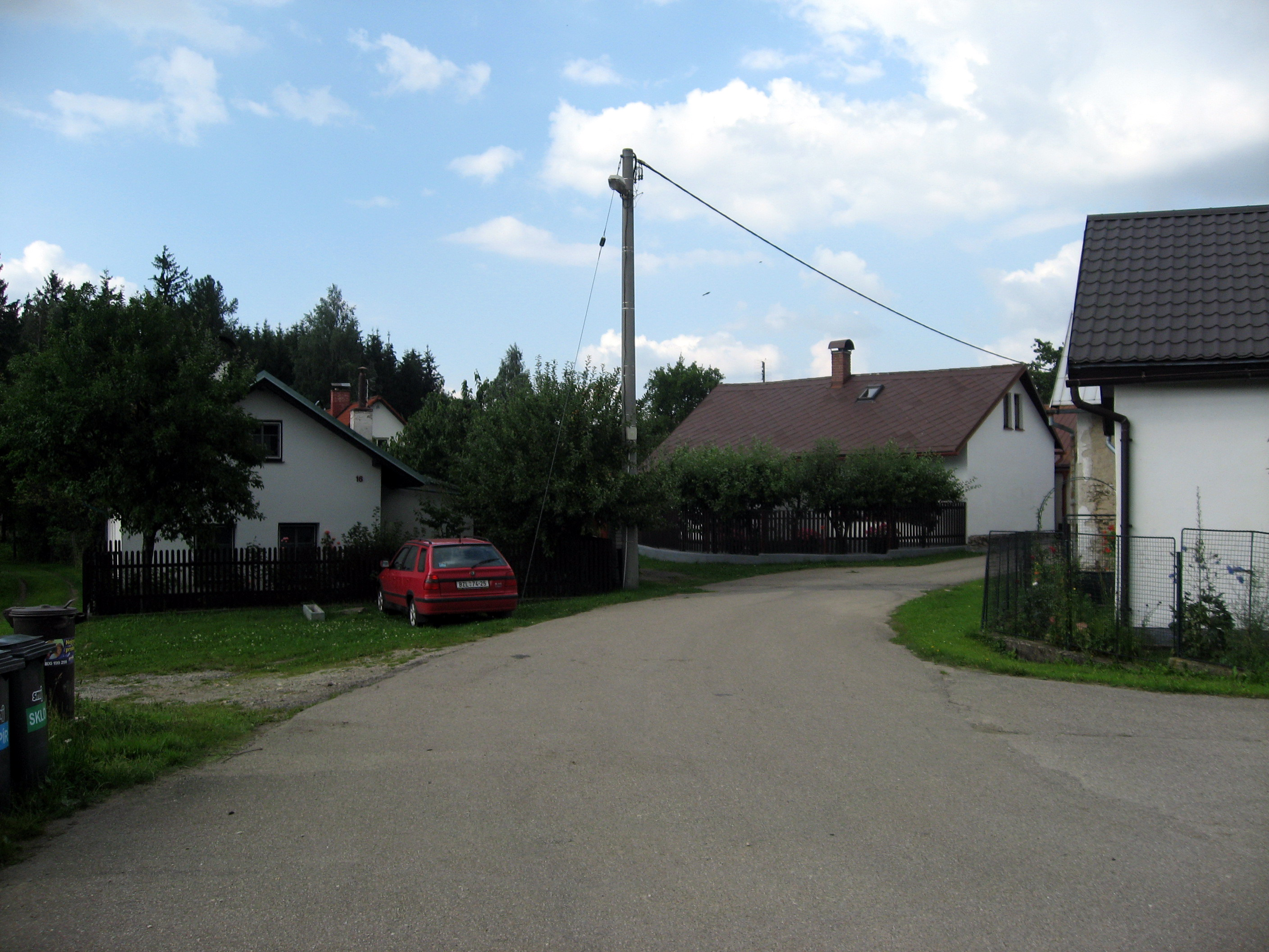 Kosovy